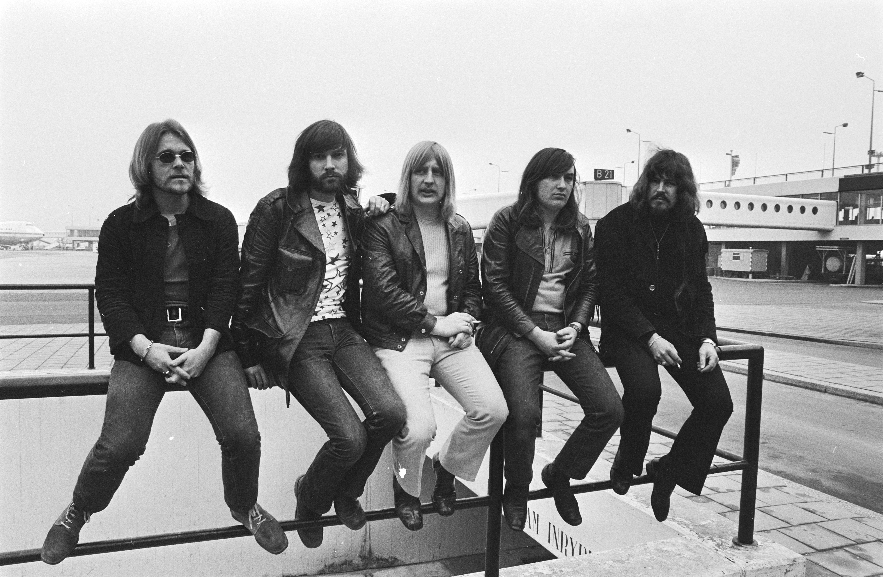 Collectie / Archief : Fotocollectie Anefo Reportage / Serie : Volendamse popgroep The Cats op Schiphol voor het vertrek naar Indonesië Beschrijving : Bandleden Cees Veerman, Piet Veerman, Jaap Schilder, Arnold Mühren en Theo Klouwer Datum : 9 maart 1971 Locatie : Noord-Holland, Schiphol Trefwoorden : groepsportretten, muzikanten, popgroepen Persoonsnaam : Klouwer, Theo, Mühren, Arnold, Schilder, Jaap, Veerman, Cees, Veerman, Piet Fotograaf : Fotograaf Onbekend / Anefo, [onbekend] Auteursrechthebbende : Nationaal Archief Materiaalsoort : Negatief (zwart/wit) Nummer archiefinventaris : bekijk toegang 2.24.01.05 Bestanddeelnummer : 924-3409